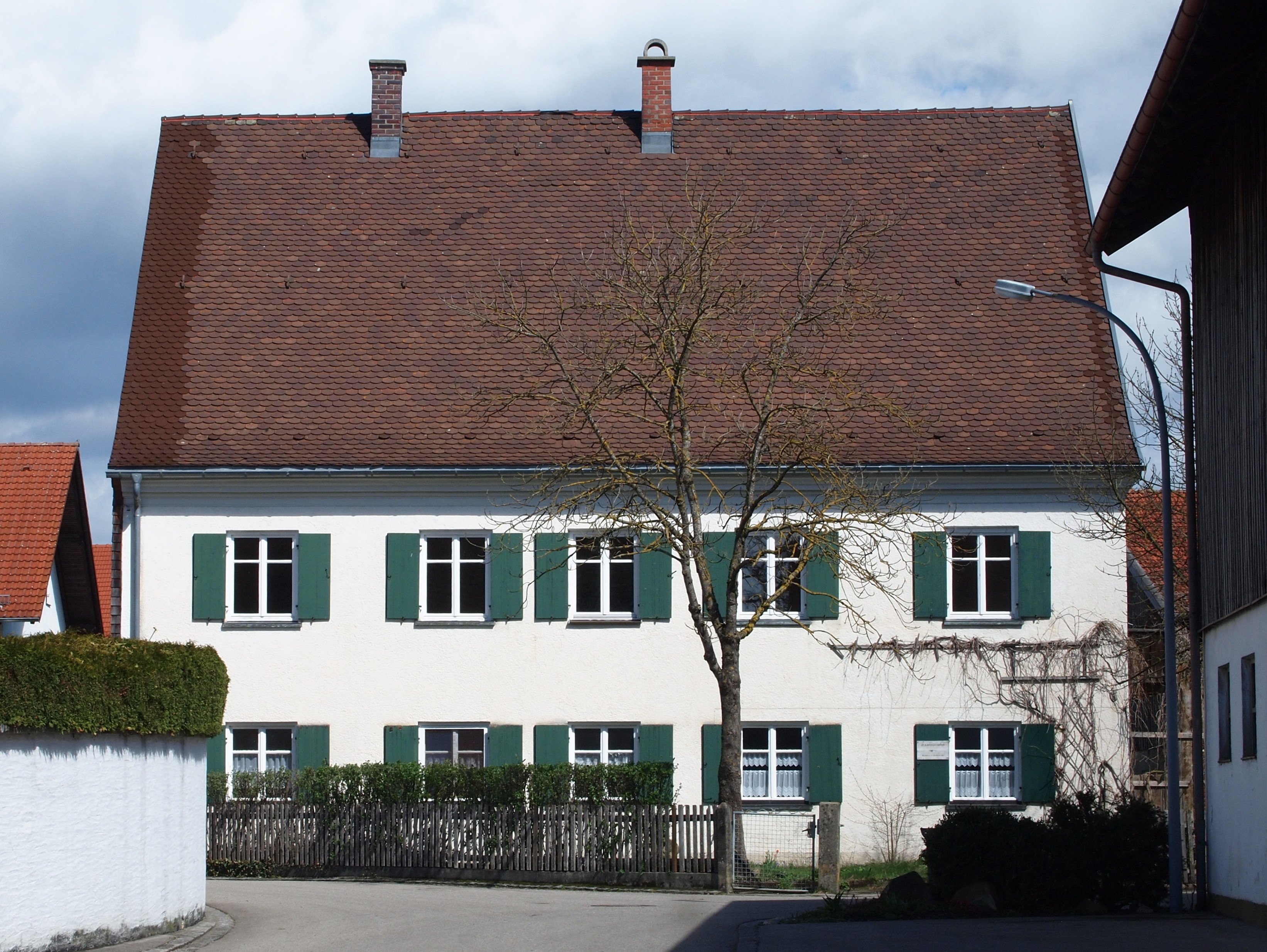 Friedhofweg 1, Pfarrhaus der Katholischen Pfarrkirche Mariae Himmelfahrt im OT Altdorf (Biessenhofen)